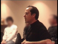 Arthur Nauzyciel en entretien avec des étudiants.